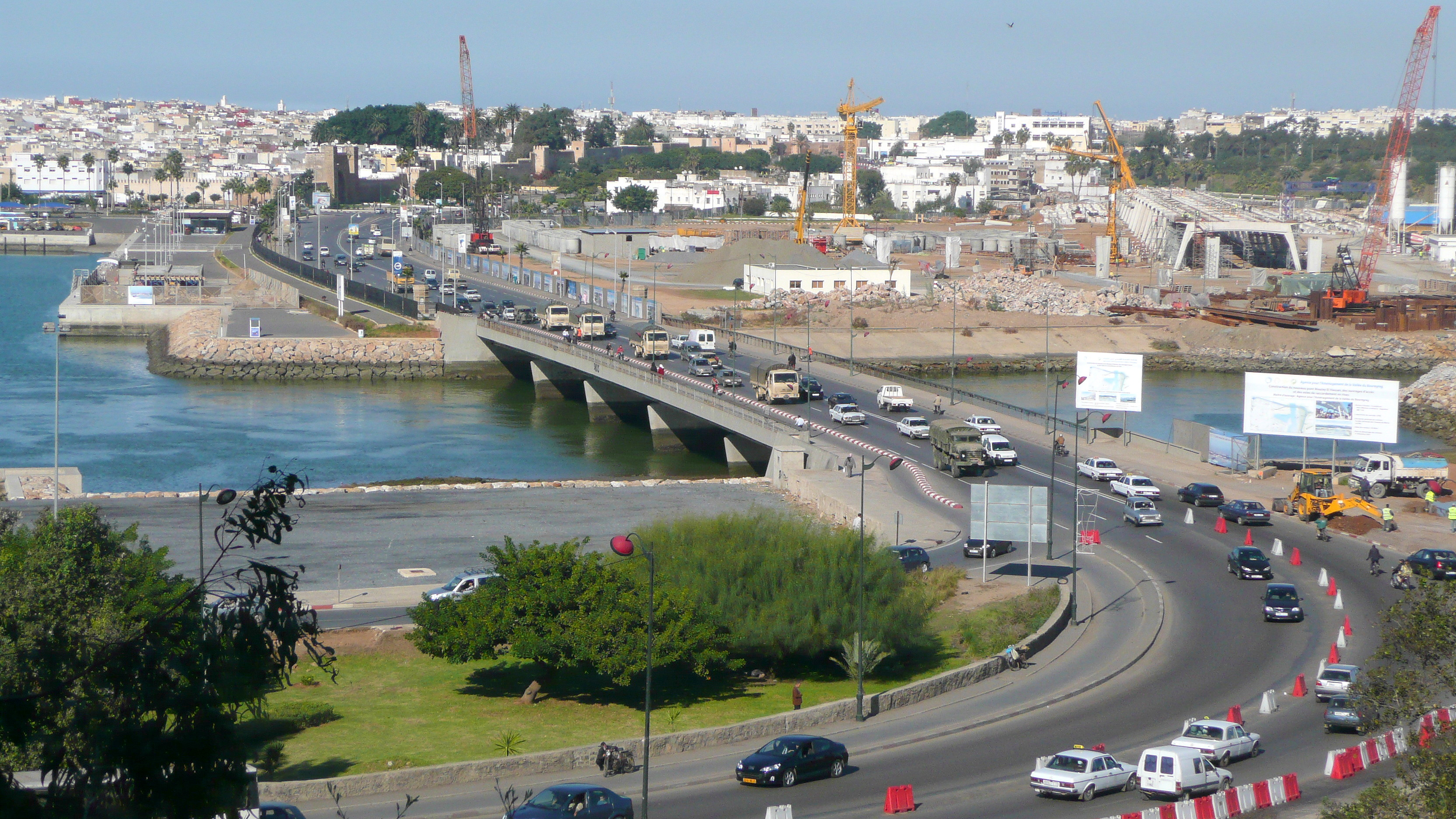 Le pont Moulay-Hassan, en fonctionnement de 1957 à 2011 et détruit en 2012. Il constituait l'un des deux ponts routiers (voire trois si on ajoute celui de la rocade de l'autoroute) assurant la desserte entre Rabat et Salé (Maroc) et a été remplacé un peu en amont par le pont Hassan-II.